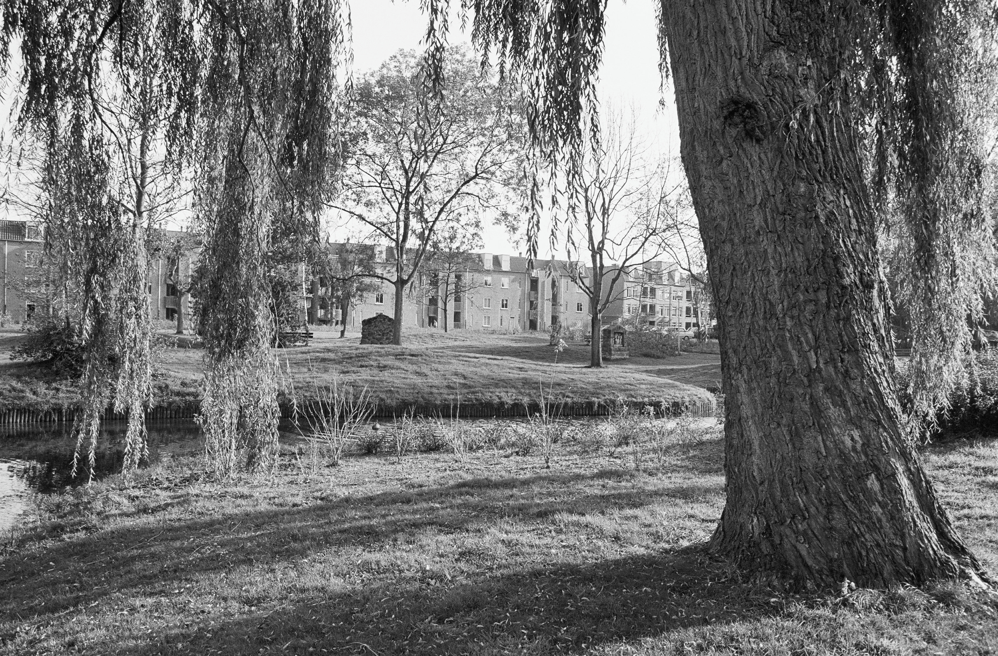 Kruiswegstatie: Exterieur OVERZICHT, KRUISWEGSTATIE